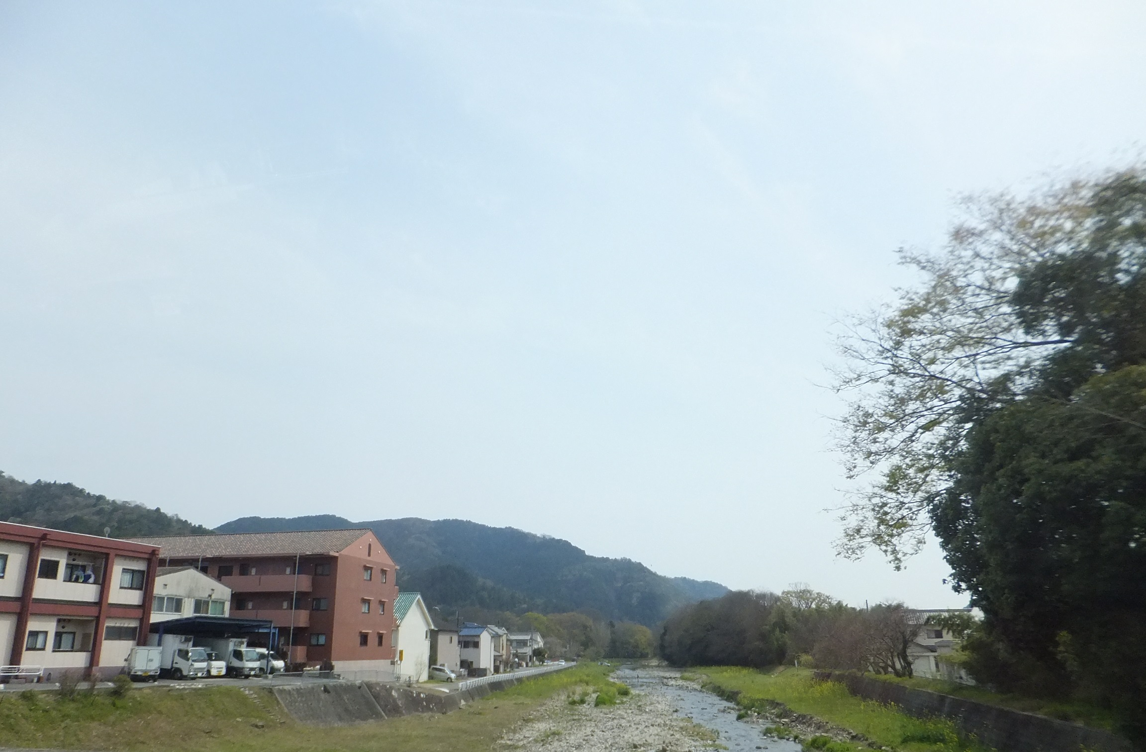 姫路市夢前町菅生澗 菅生川